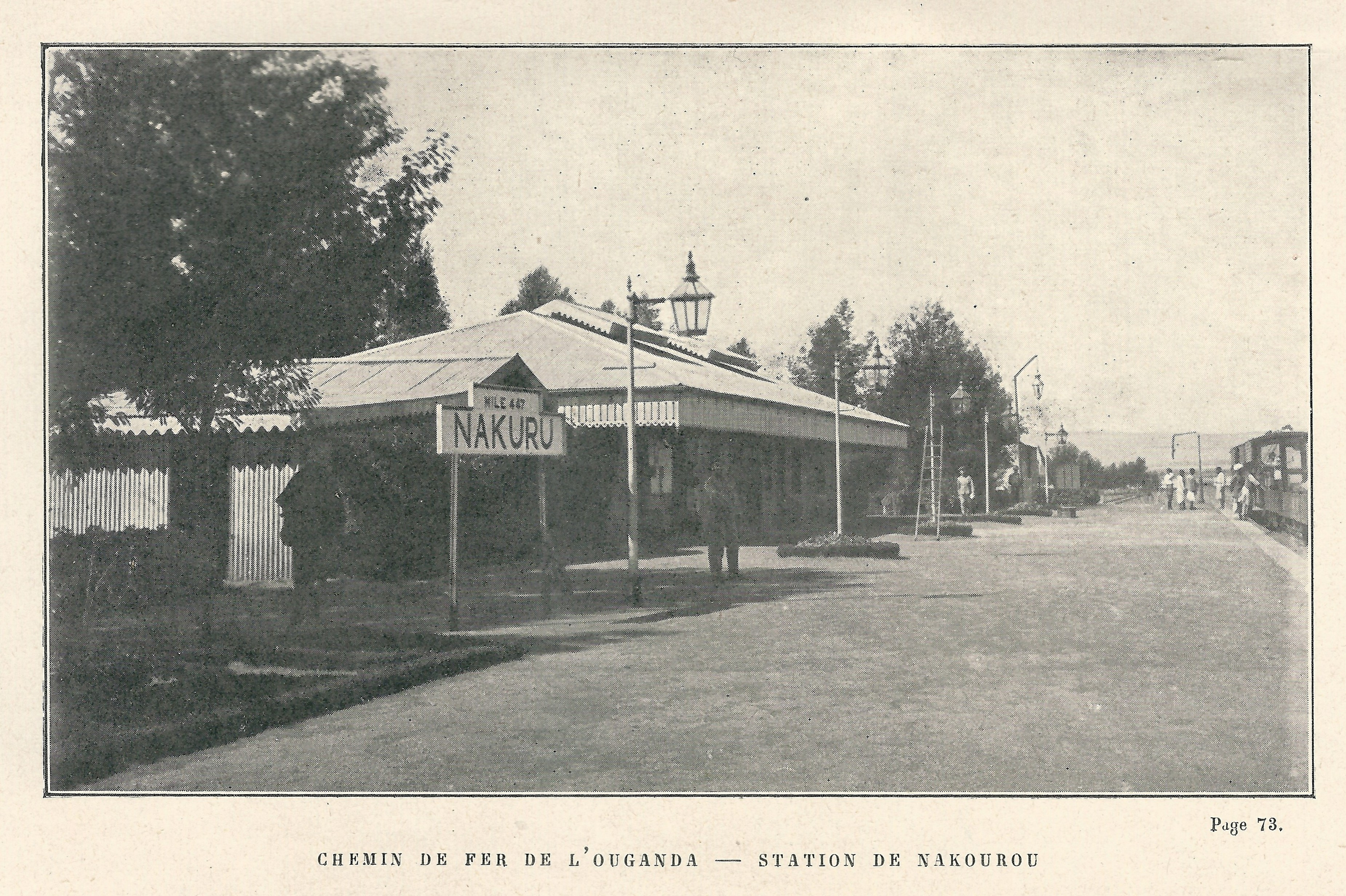 Illustration de l'ouvrage : Jules Leclercq , Aux sources du Nil par le chemin de fer de l'Ouganda, 1913